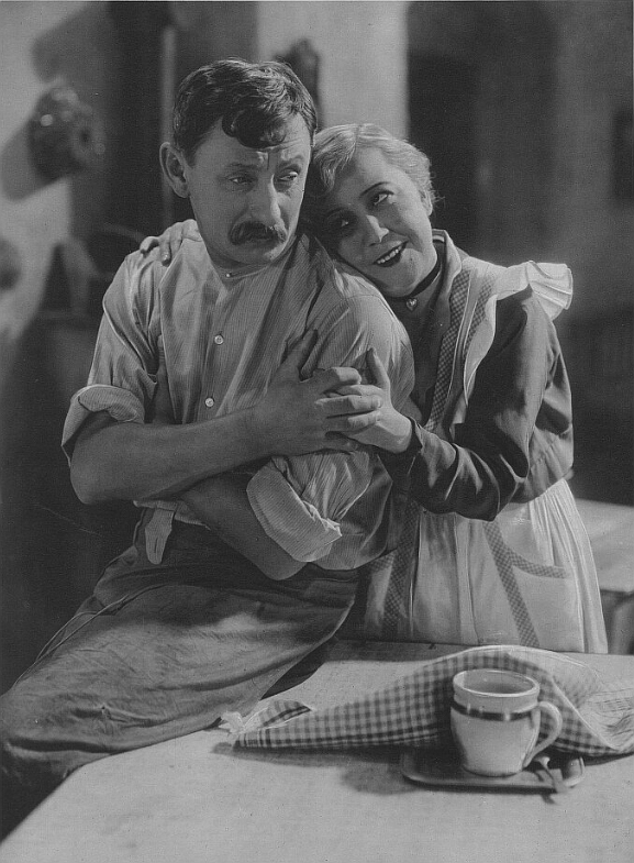 Vlasta Burian a Růžena Šlemrová ve filmu Anton Špelec ostrostřelec (1932)